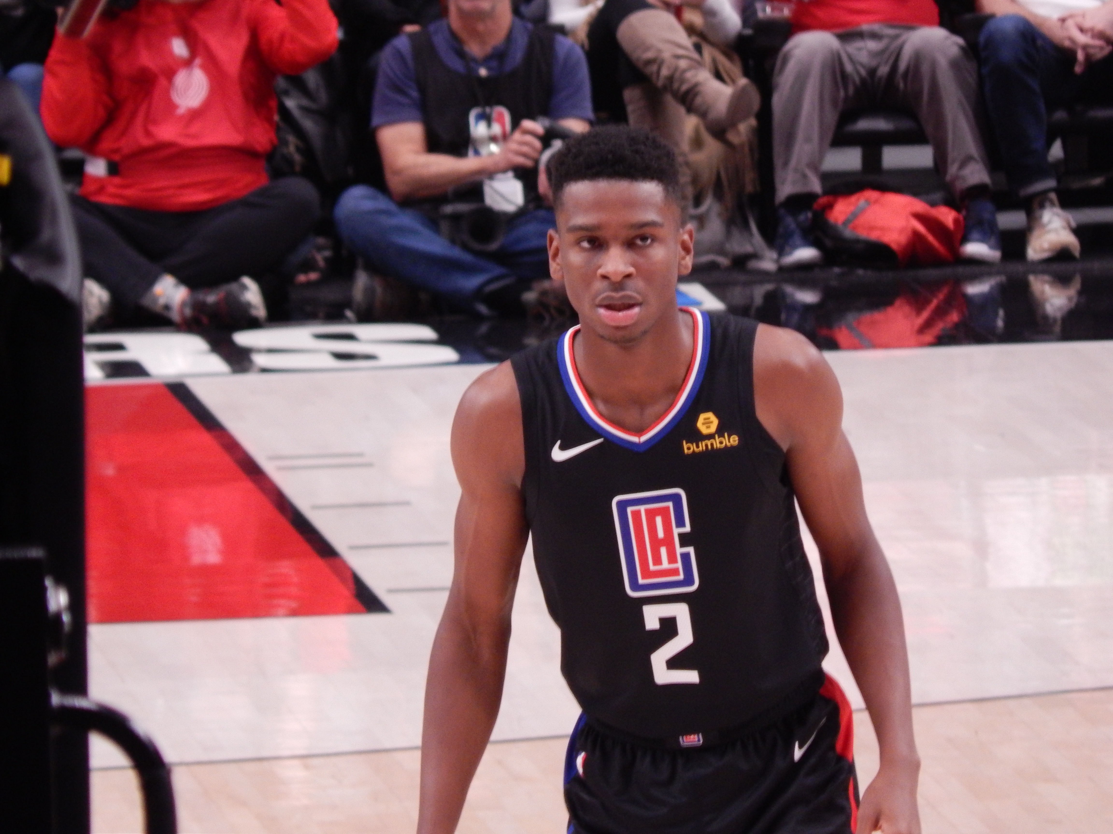 Shai Gilgeous-Alexander #2 of the Los Angeles Clippers against the Portland Trail Blazers on November 8, 2018 at Moda Center in Portland, Oregon.